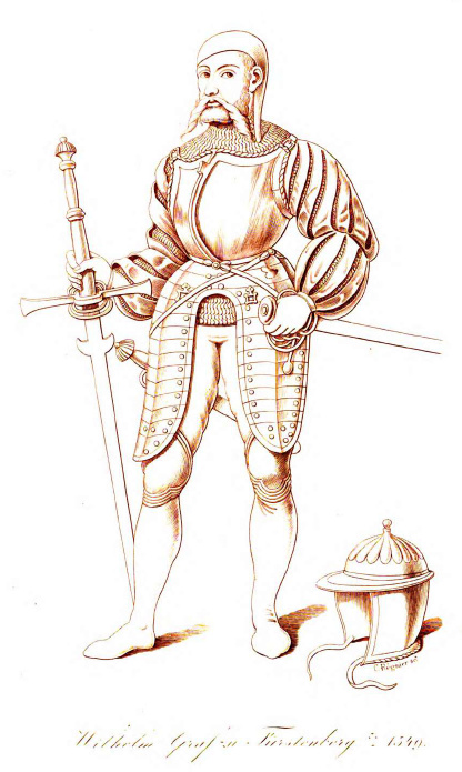 Wilhelm Graf zu Fürstenberg (1491-1549); Zeichnung von Heinrich Frank nach einem Ölgemälde in Lebensgröße auf Schloss Heiligenberg. Auf dem Kopf trägt Wilhelm eine schwarze Haube, wie sie damals unter dem Helm getragen wurde.(zur Beschreibung siehe Google Digitalisat